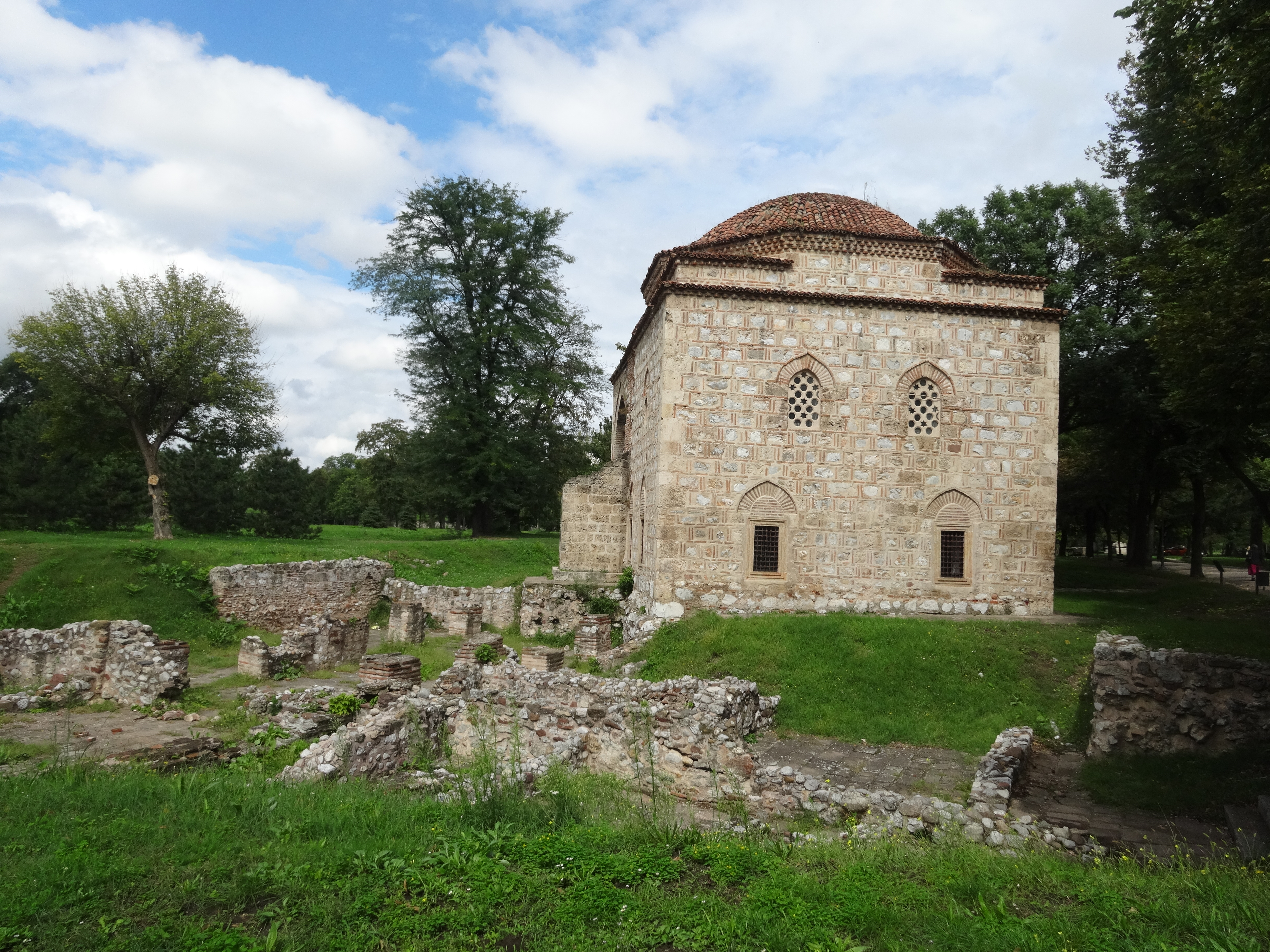 Bali-begova džamija